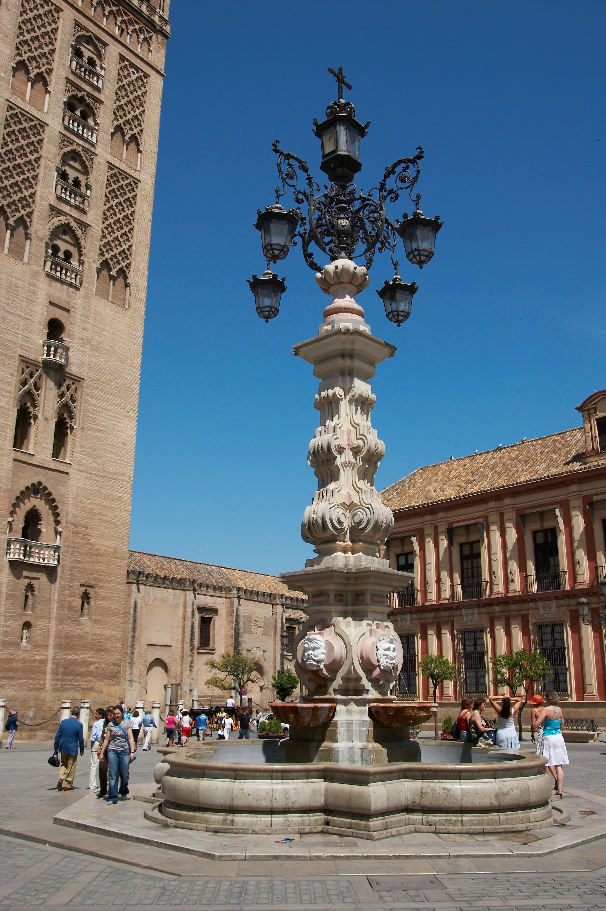 Plaza de la Virgen de los Reyes, Sevilla, España.